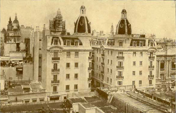 Vista desde una azotea del Pasaje "La Rural", luego renombrado "Rodolfo Rivarola". Une las calles Mitre y Juan D. Perón, entre las calles Talcahuano y Uruguay. Al fondo, se destaca la torre del Palacio Barolo, en la Avenida de Mayo. Buenos Aires, Argentina.